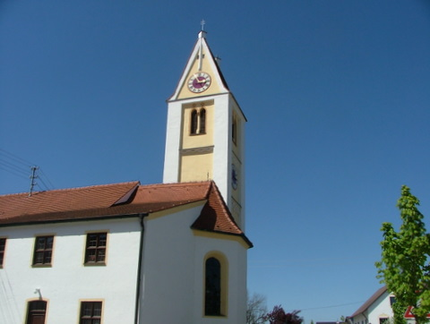 Stetten in Schwaben